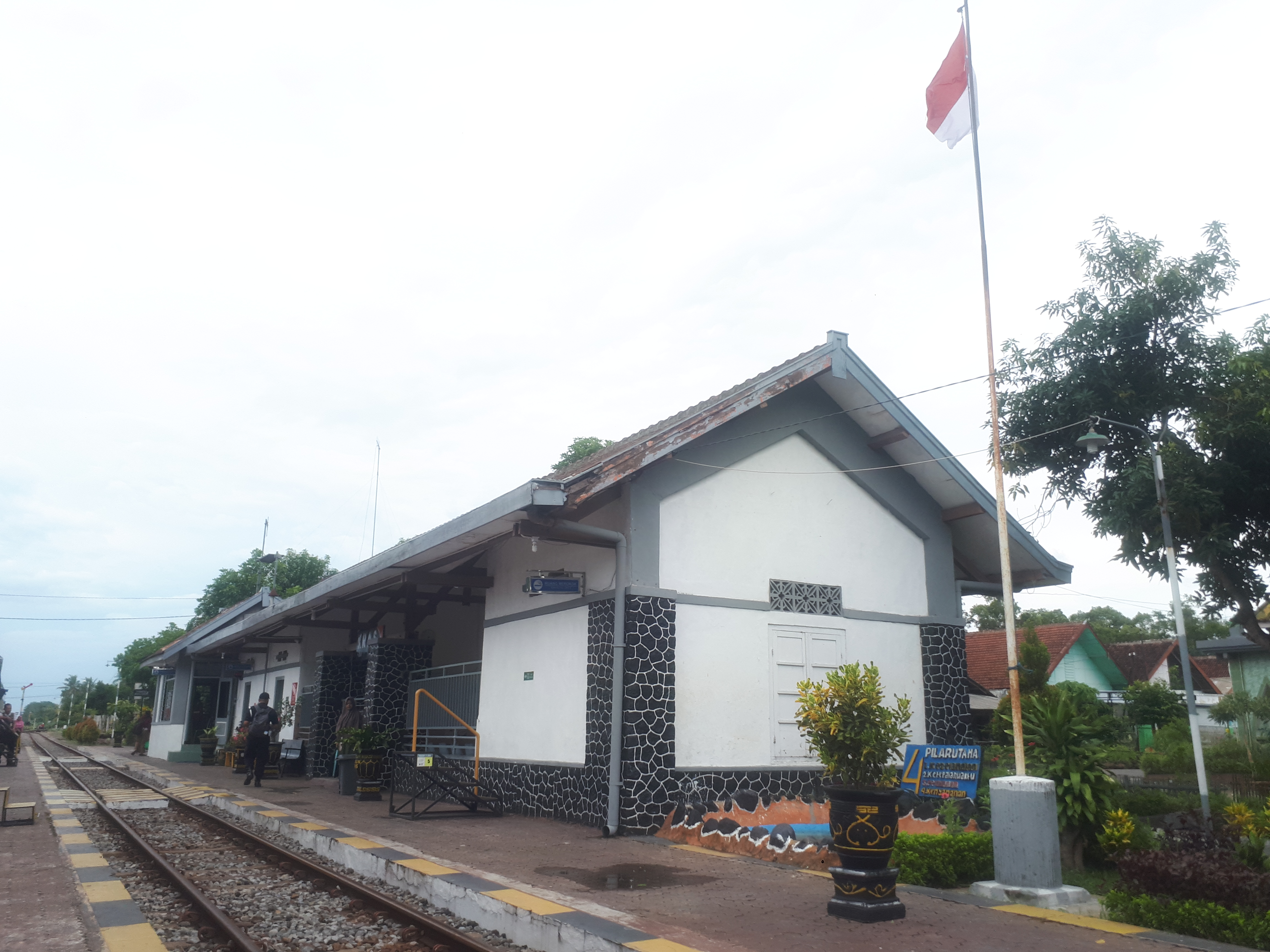 Stasiun Kras pada tahun 2020